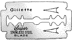 eigen werk; deze afbeelding niet verplaatsen